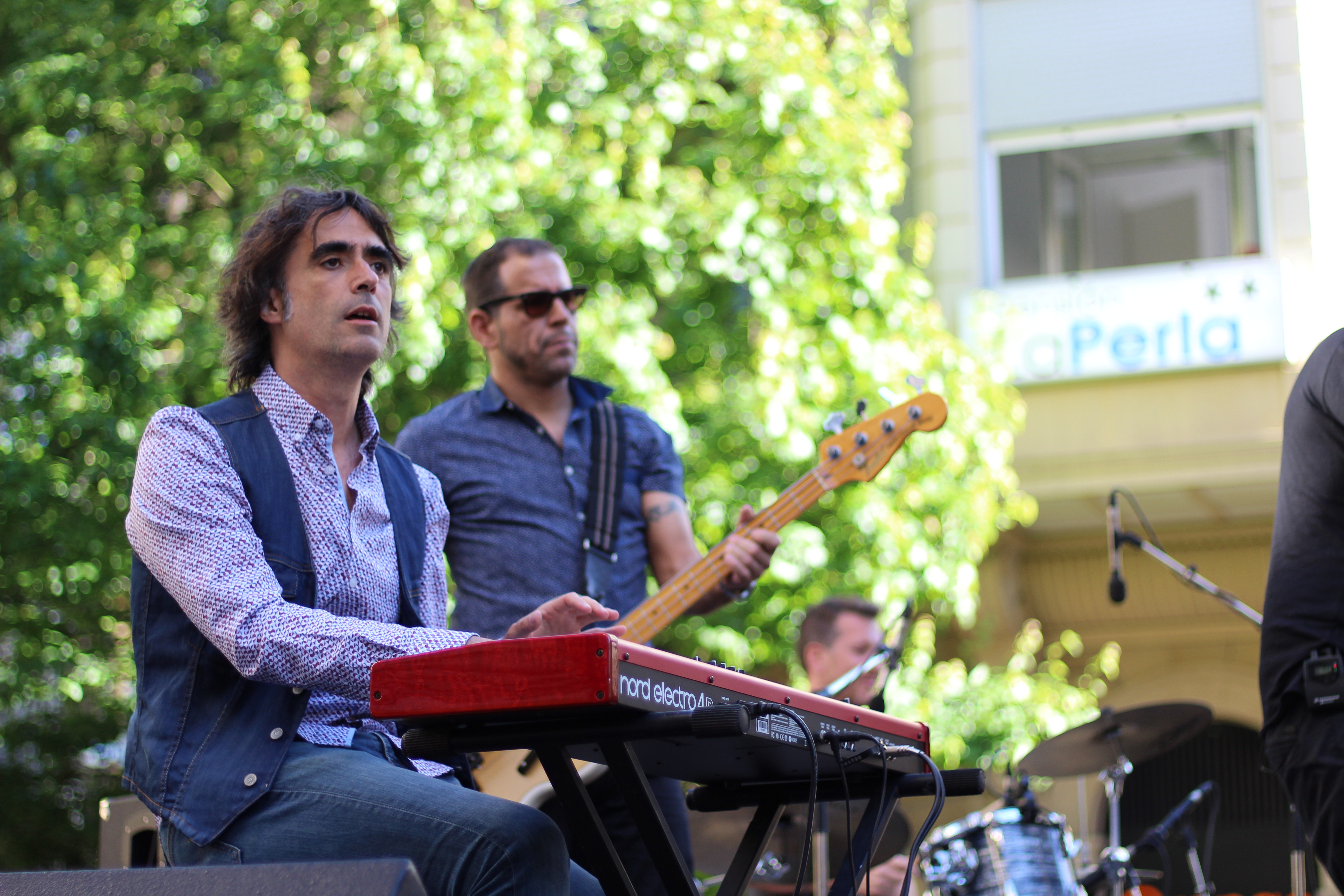 Mikel Azpiroz, Donostiako Musikaren Egunean (2018), Travellin' Brothers taldearekin.